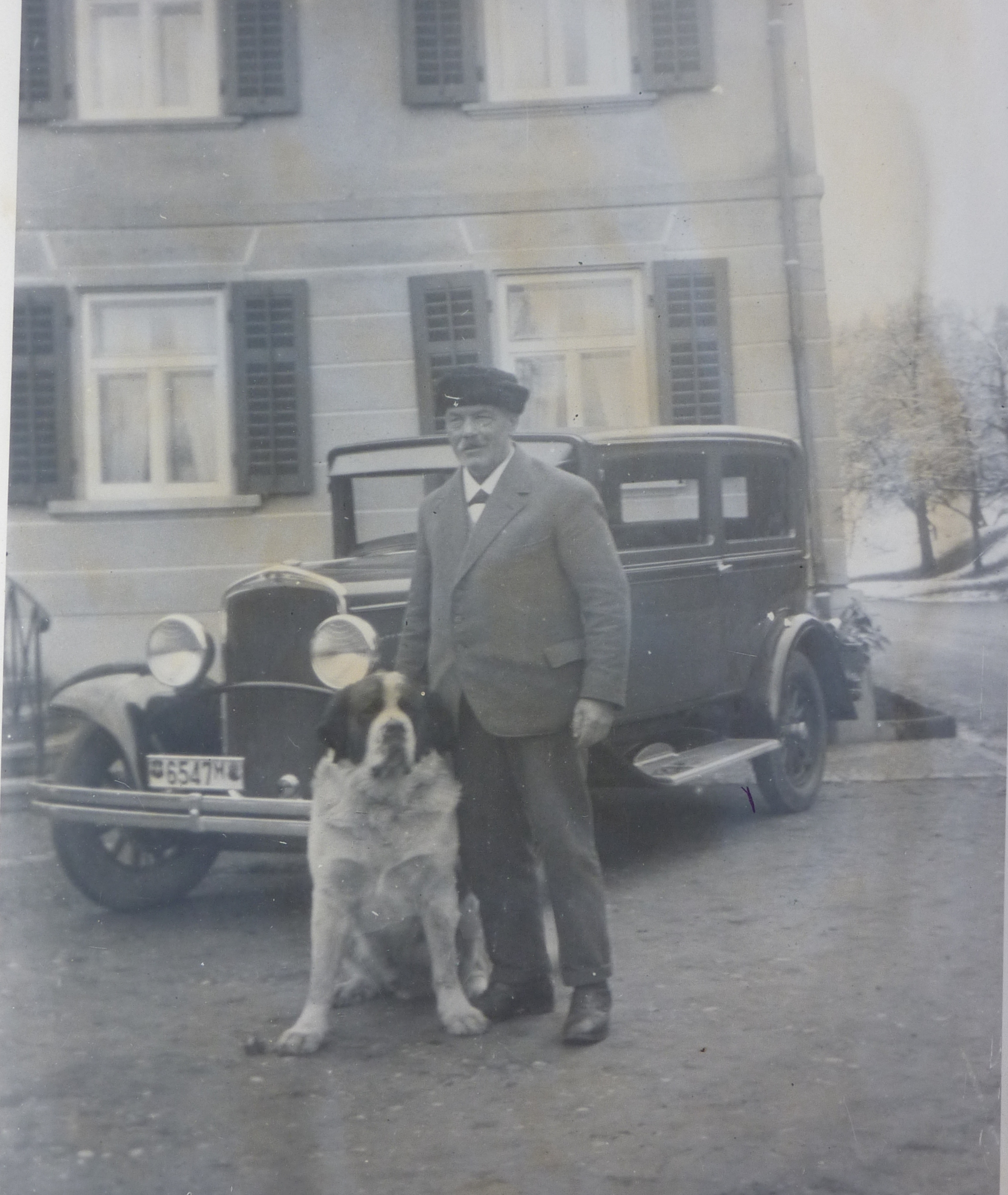 Hermann Spiess 1866-1930, vor dem Gutshaus mit Hund und Auto